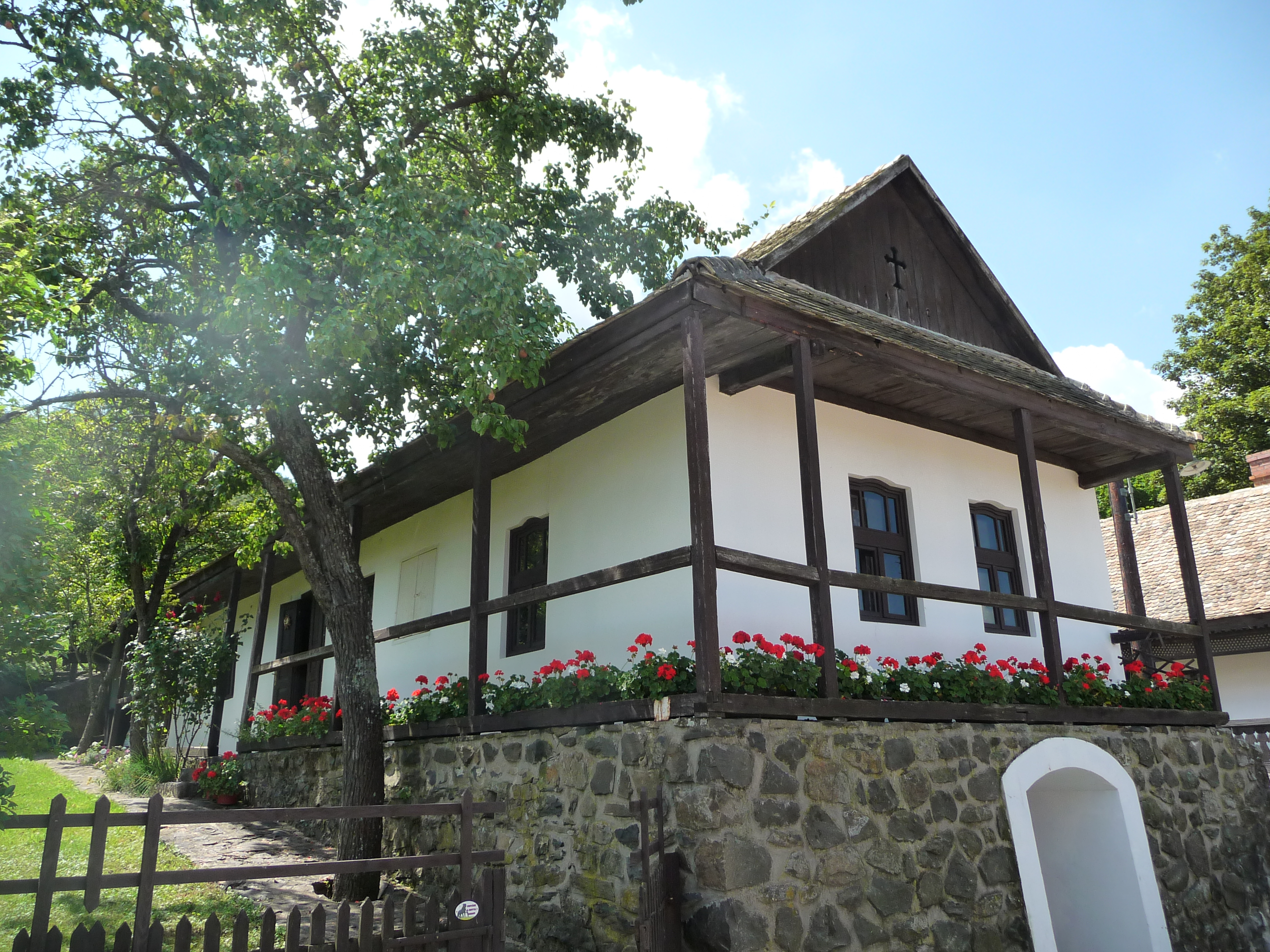 Hollókő, Kossuth u. 106. This is a photo of a monument in Hungary. Identifier: 6638